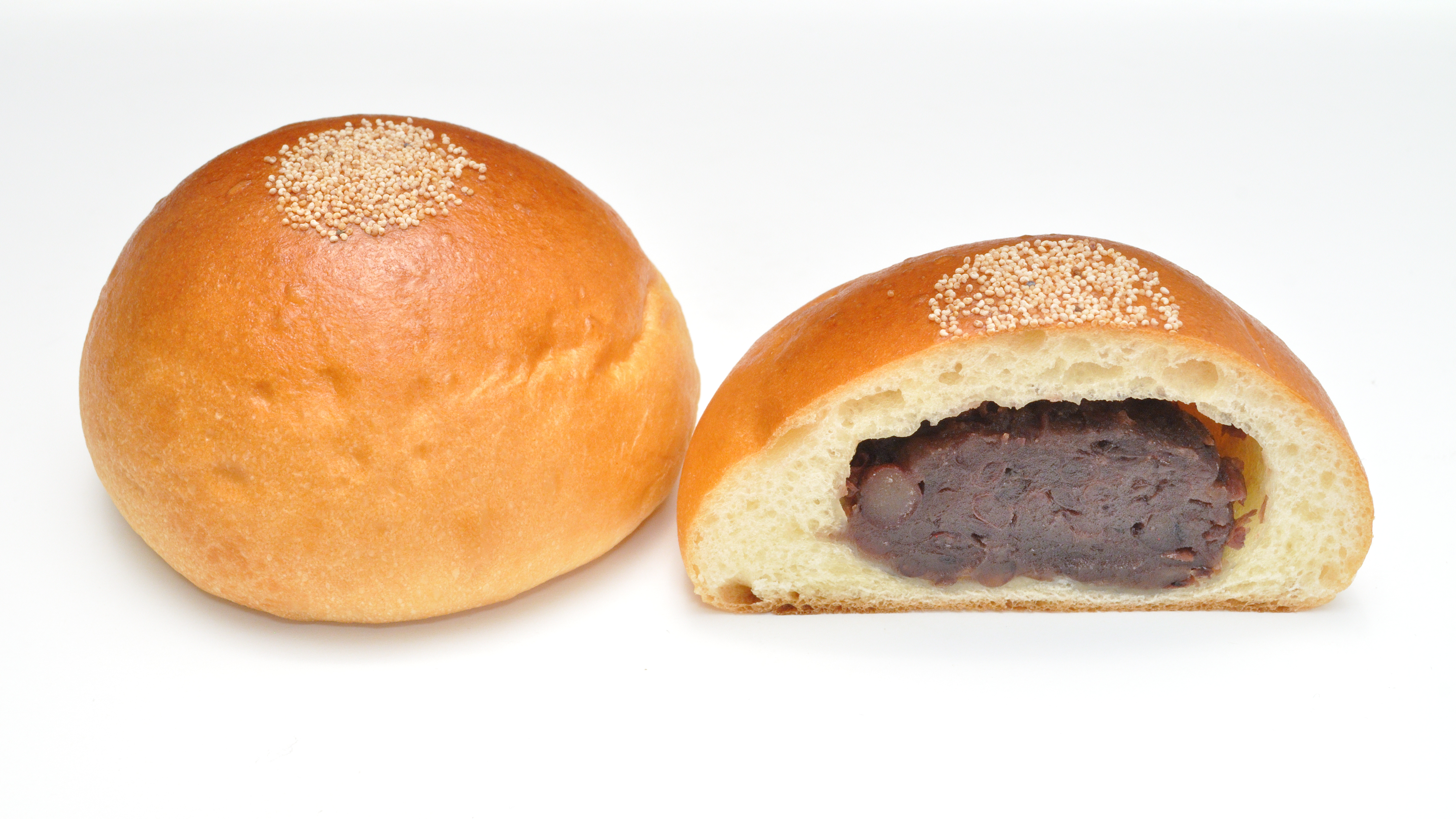 あんパン。アクセントにトッピングされているのはケシの実。